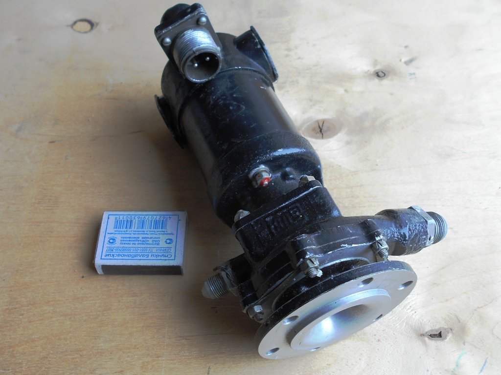 Электрический центробежный насос ЭЦН-19